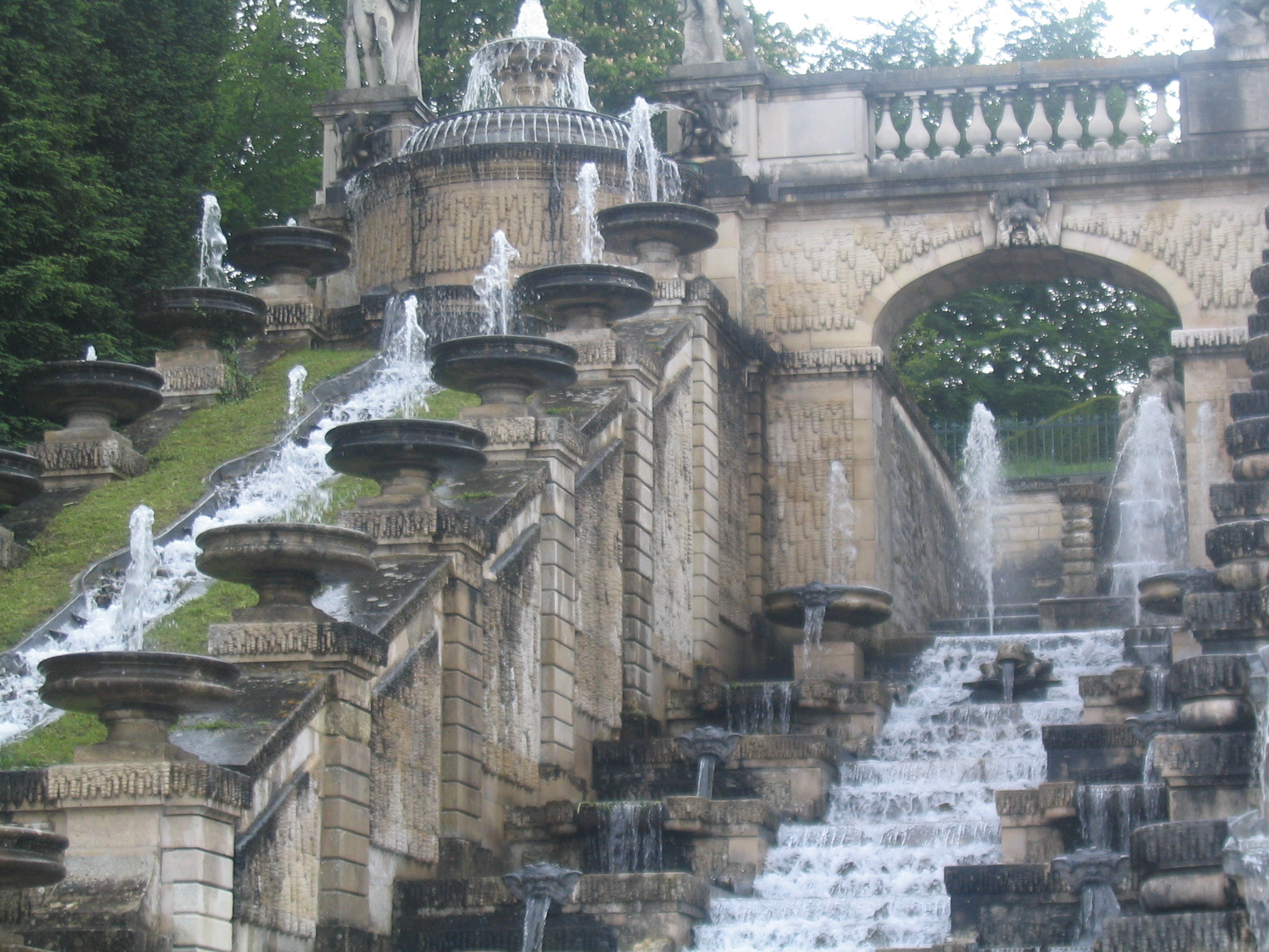 Parc de Saint-Cloud, France - Fontaine de Le Pautre (1660-1665)